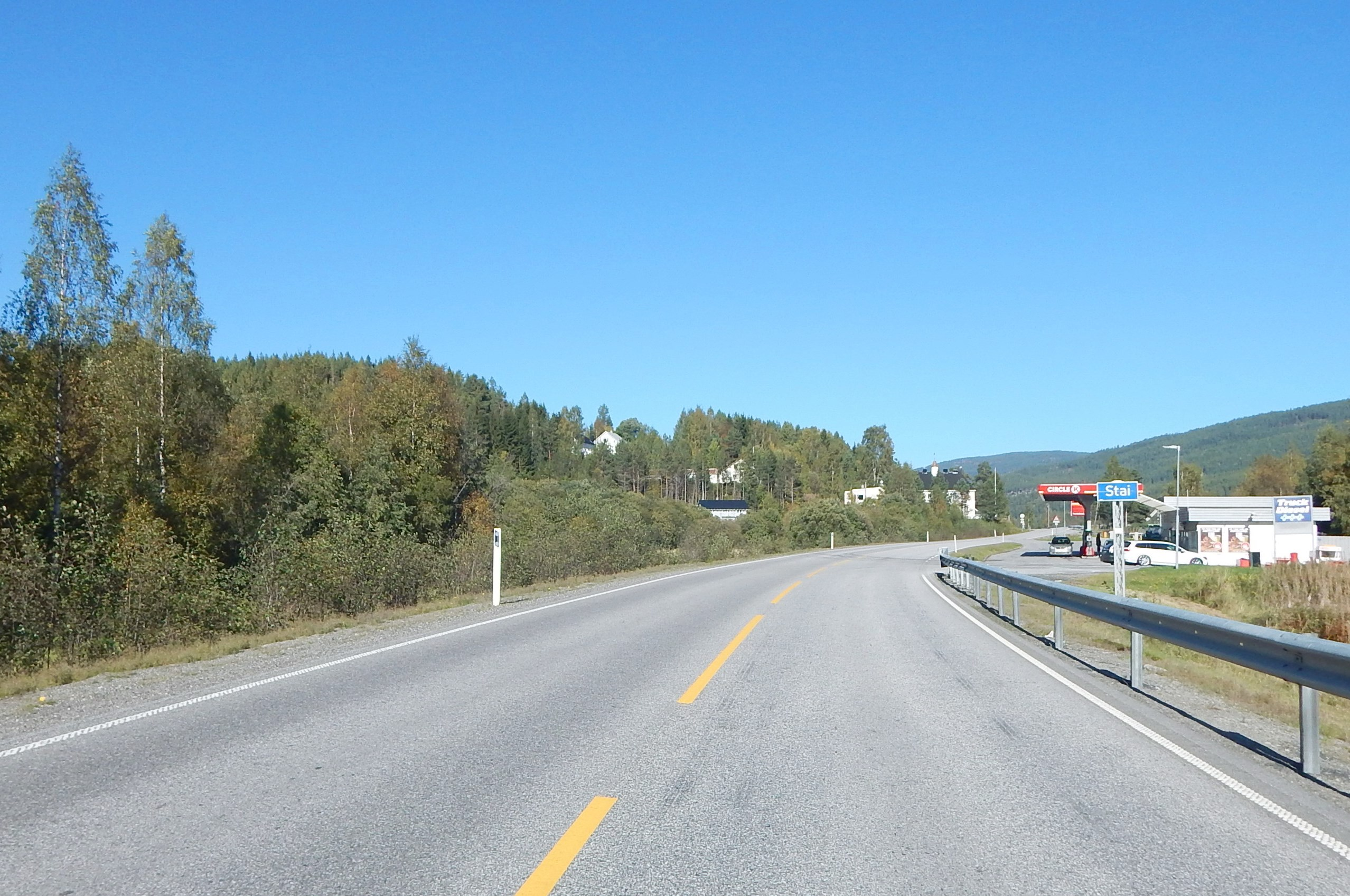 Riksvei 3 mot Stai sørfra